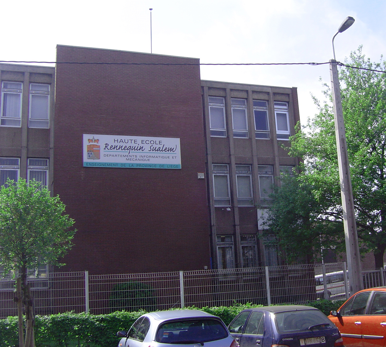 Haute Ecole de la Province de Liège - Rennequin Sualem - Implantation de Seraing (Institut Provincial d'Enseignement Supérieur de Seraing)